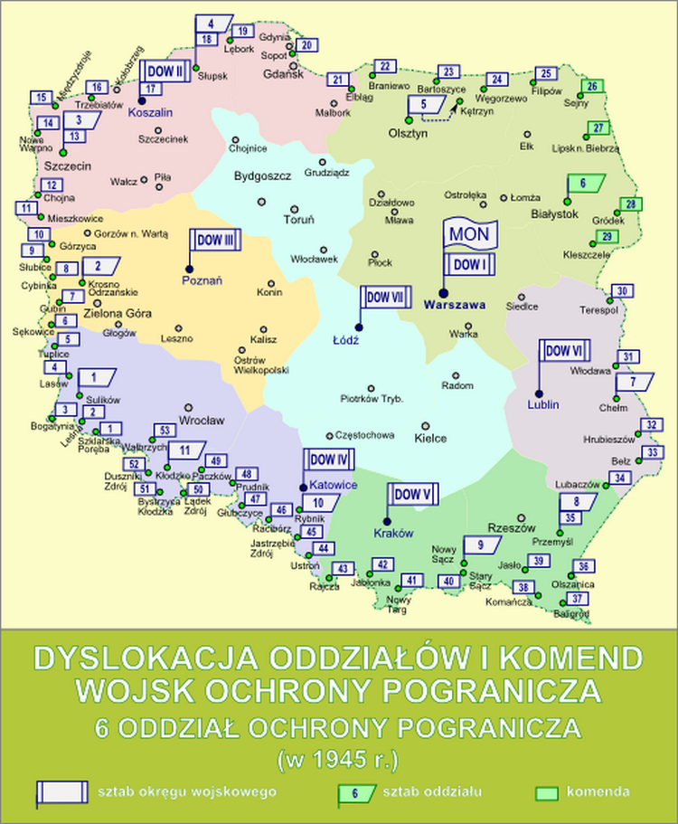 Dyslokacja oddziałów i komend Wojsk Ochrony Pogranicza - 6 Oddział Ochrony Pogranicza w 1945 r.